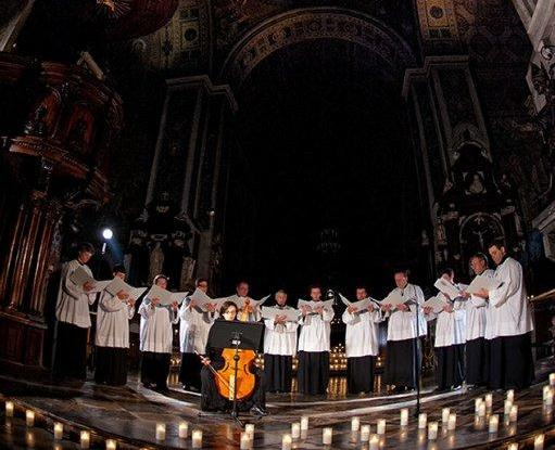 Dieses Foto zeigt die Choralschola bei ihrem Konzert in der Kathedrale von Płock, Polen. An der Gambe Maria Valencia. [1]